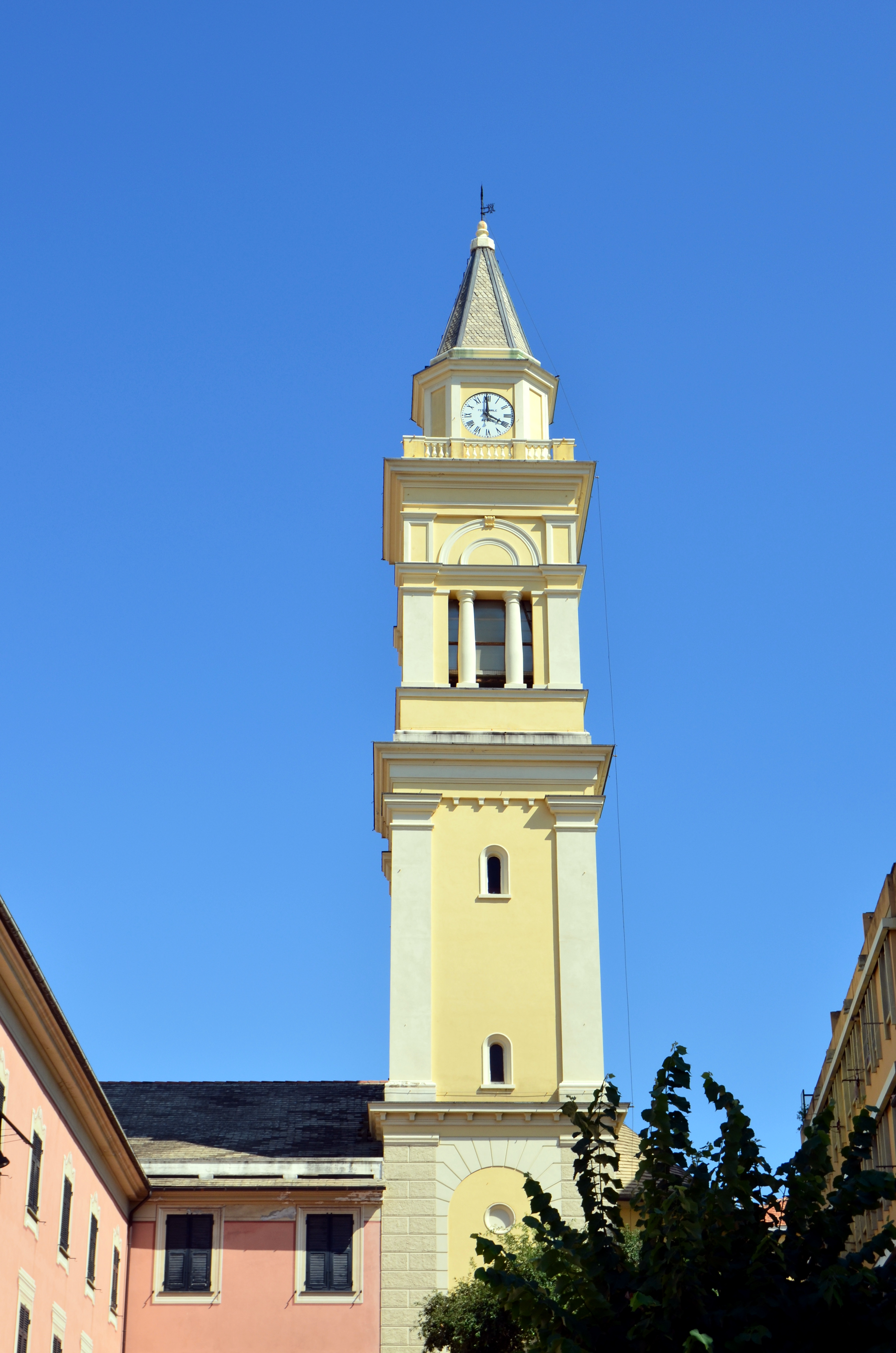 Campanile del Santuario di Nostra Signora del Carmine, Lavagna, Liguria, Italia